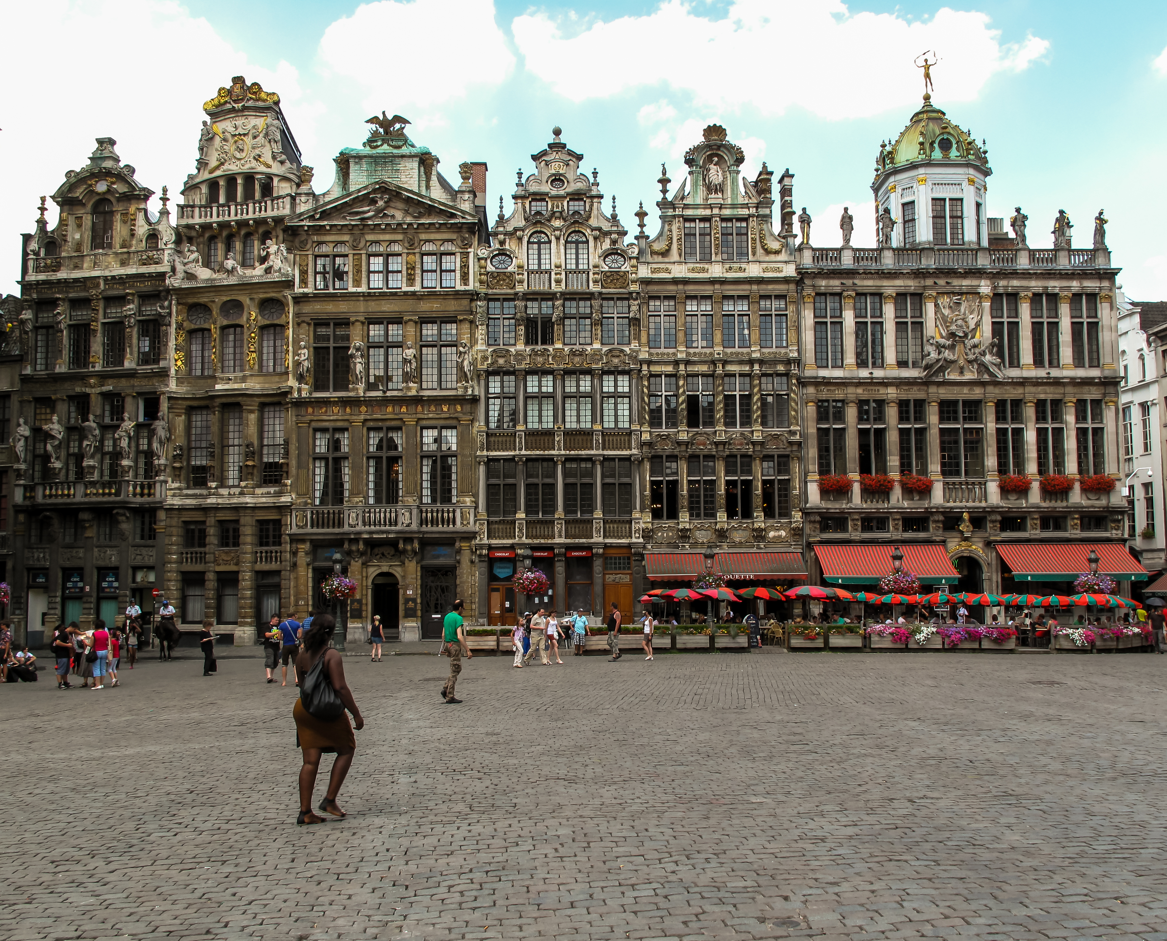 Grande Place